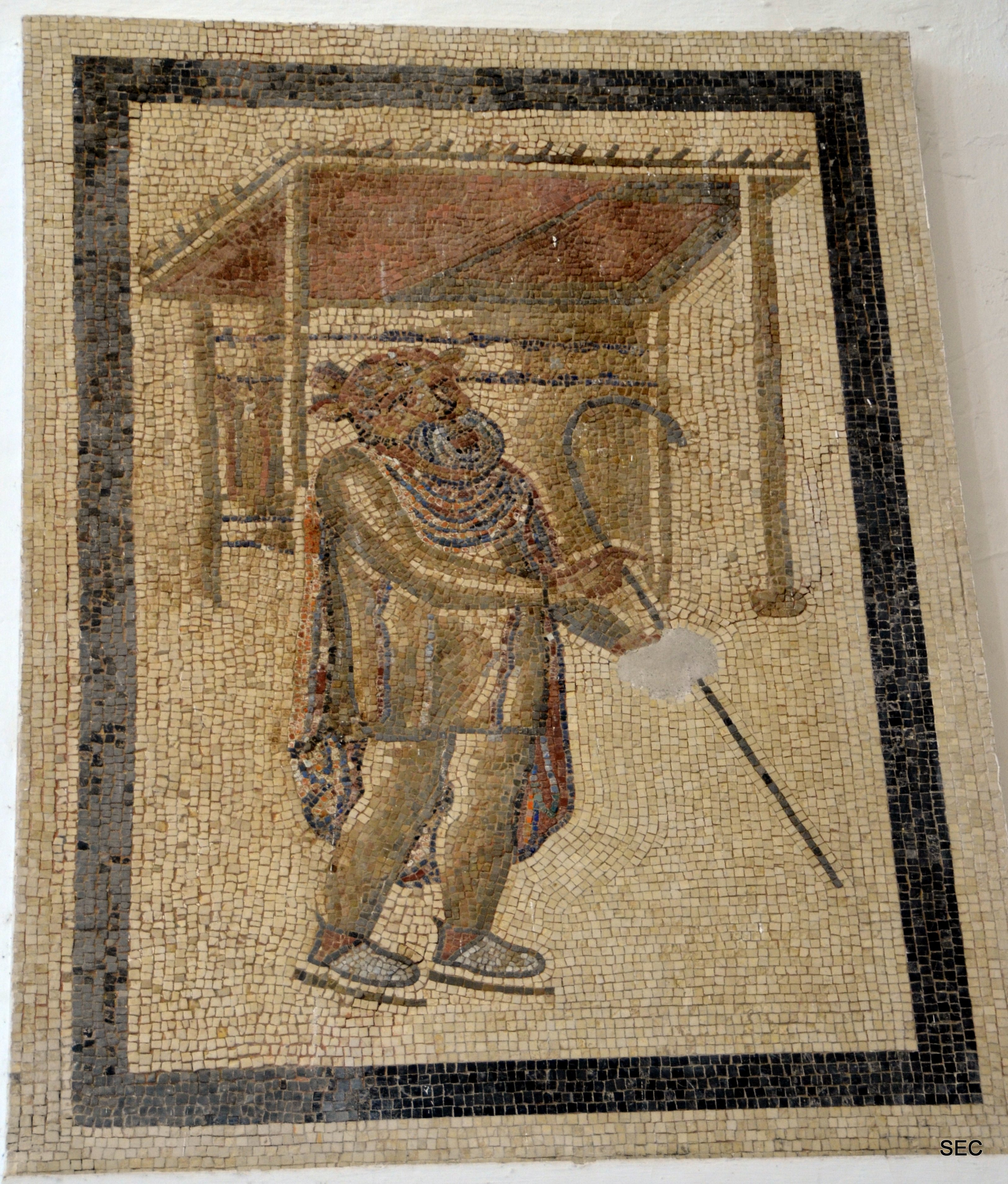 Alcázar de los Reyes Cristianos.Mosaicos hallados en excavaciones de los años 1958-1959 en la Plaza de la Corredera de Córdoba